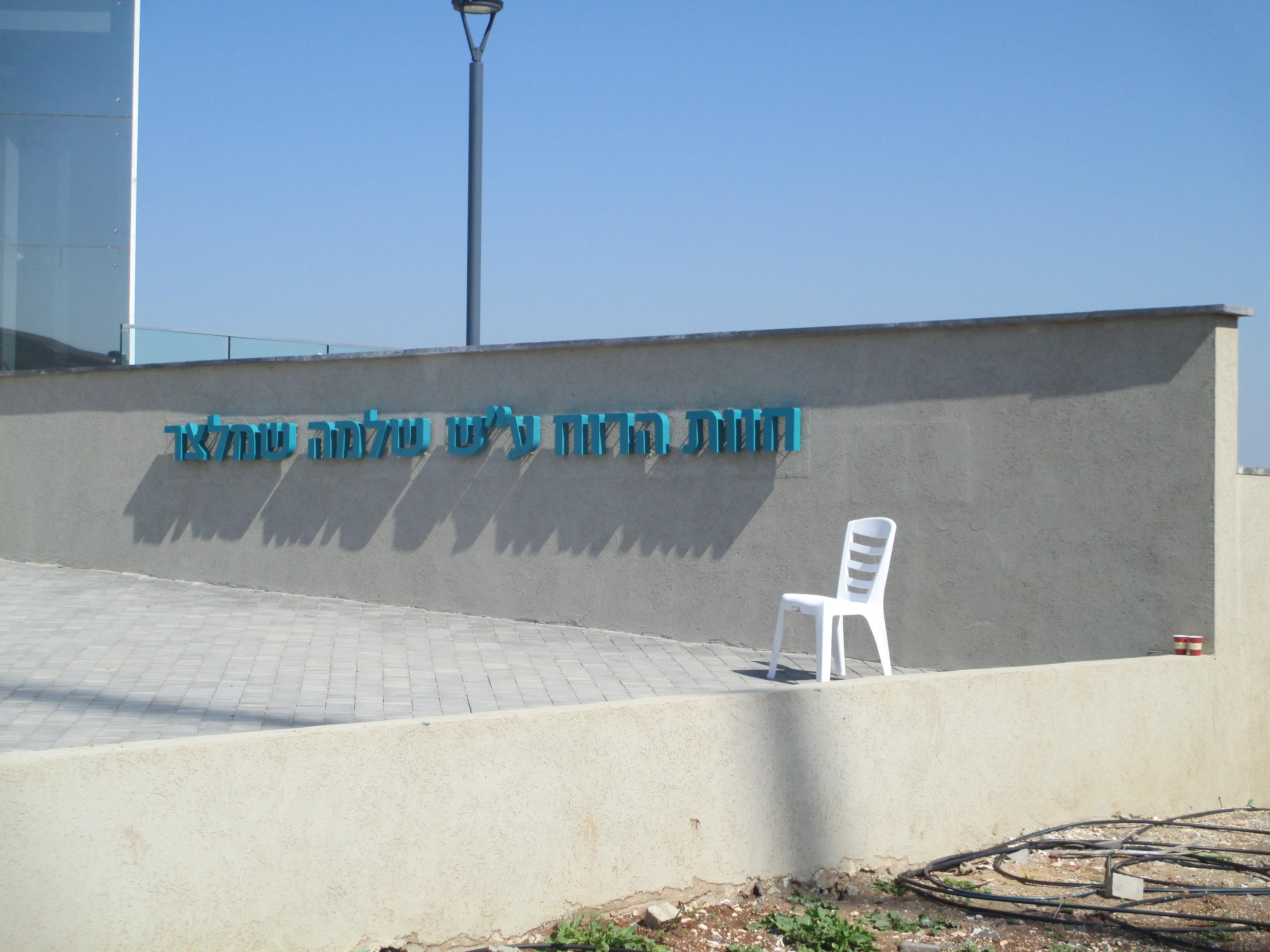 מרכז מבקרים בחוות הרוח במעלה גלבוע